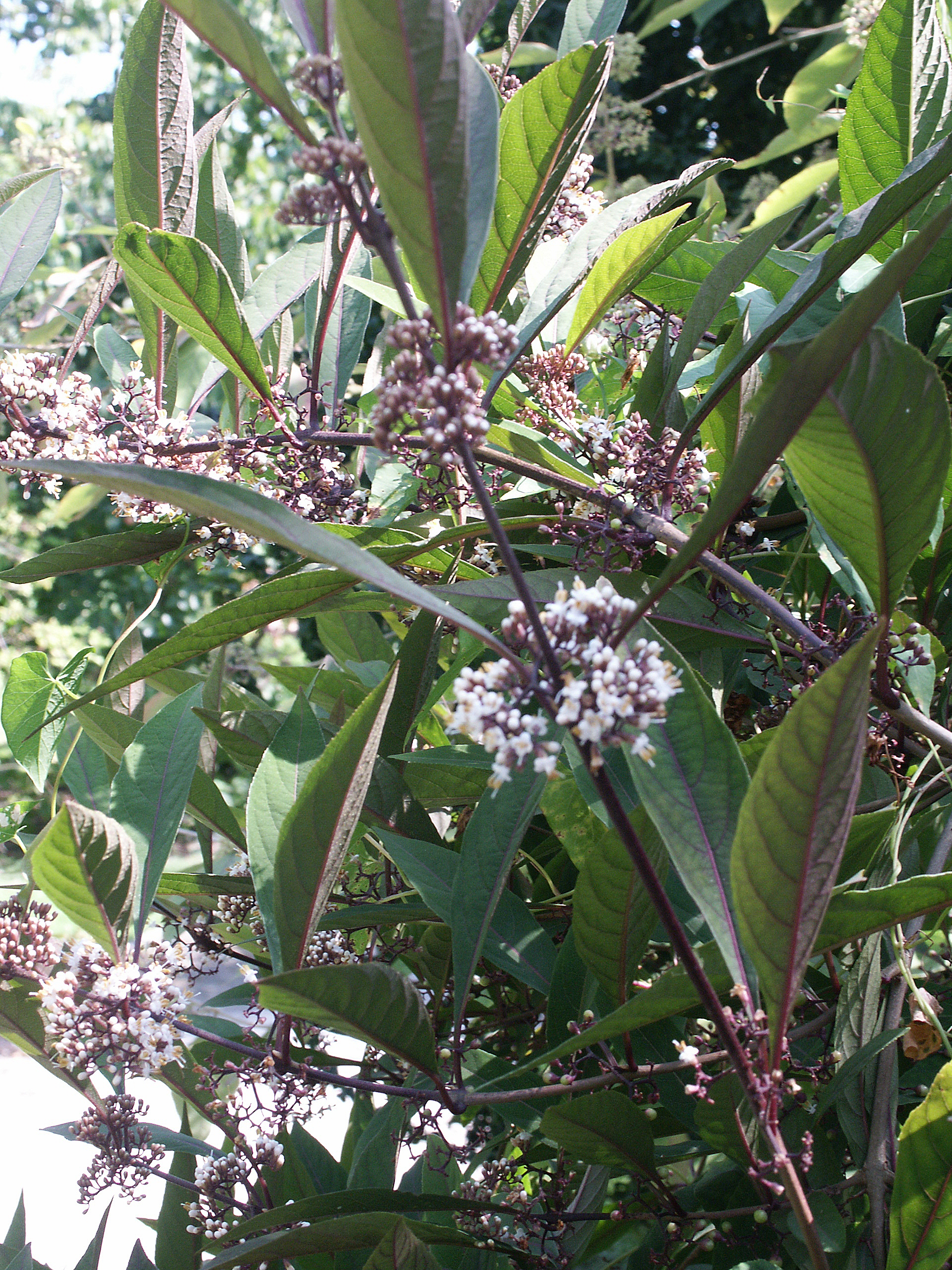 Callicarpa kwangtungensis - Inflorescences - Jardin botanique de Strasbourg - France